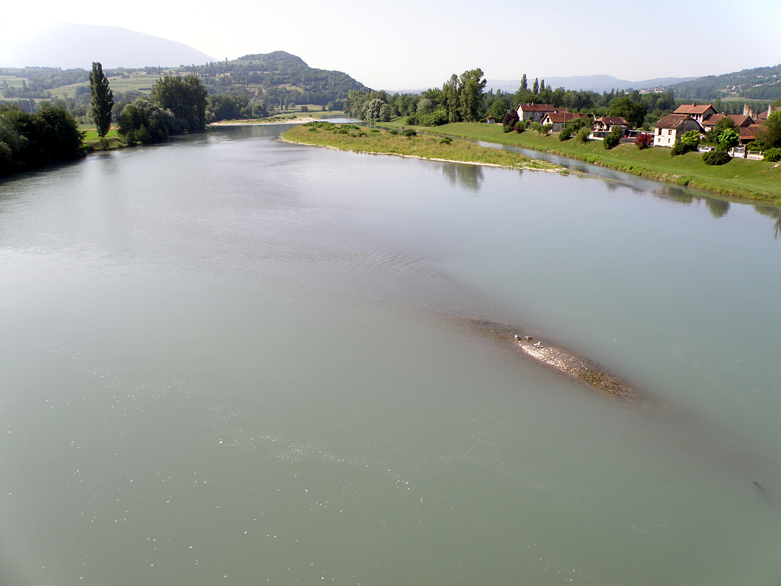 Massignieu-de-Rives, comm. dans le département de l’Ain (région Rhônes-Alpes, France). Hameau de Rives, dans l’est de la commune, sur la rive droite du Rhône. Vue prise depuis le pont de Lucey. Au fond, au centre gauche, promontoire sur lequel se dresse la chapelle Saint-Romain (comm. de Jongieux).